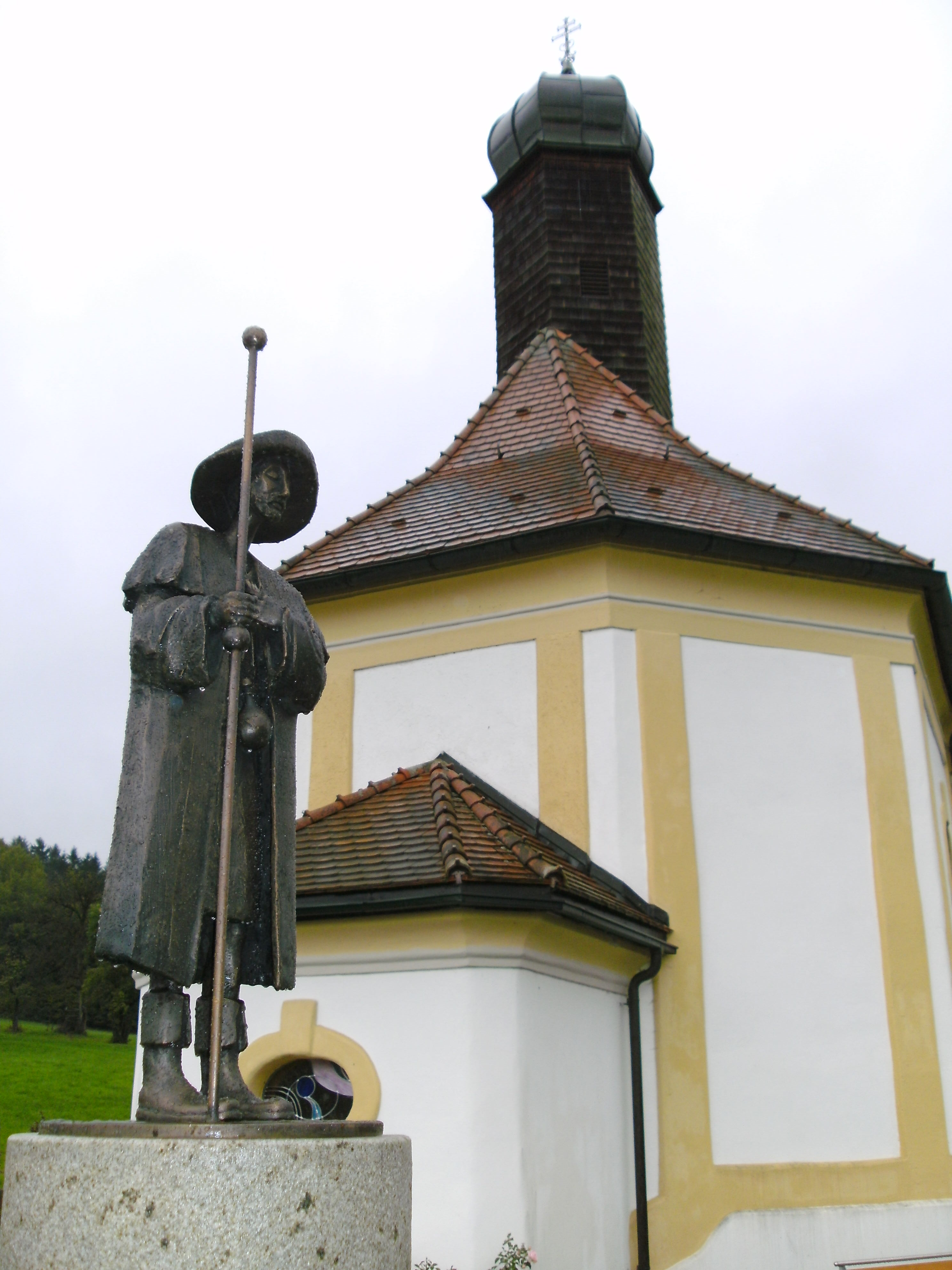 Kolomannkirche außen